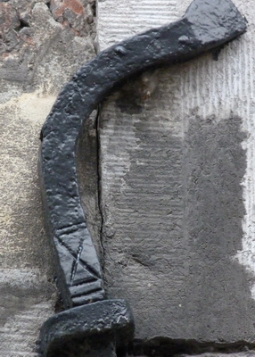 schuinkruis met twee horizontale strepen erboven en beneden, gehakt in een schootanker